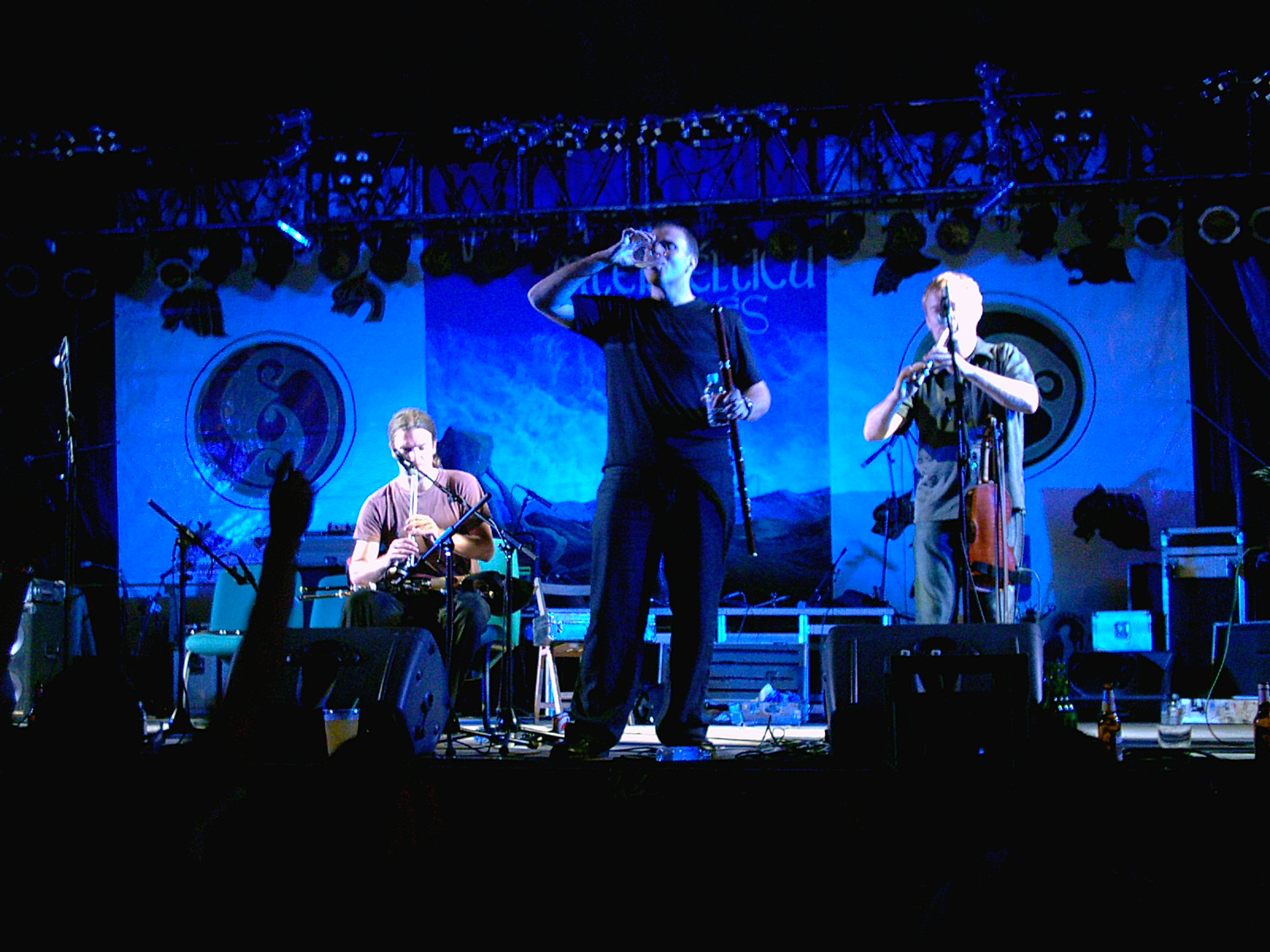 Lunasa performs at Interceltic Festival of Avilés (Asturias)